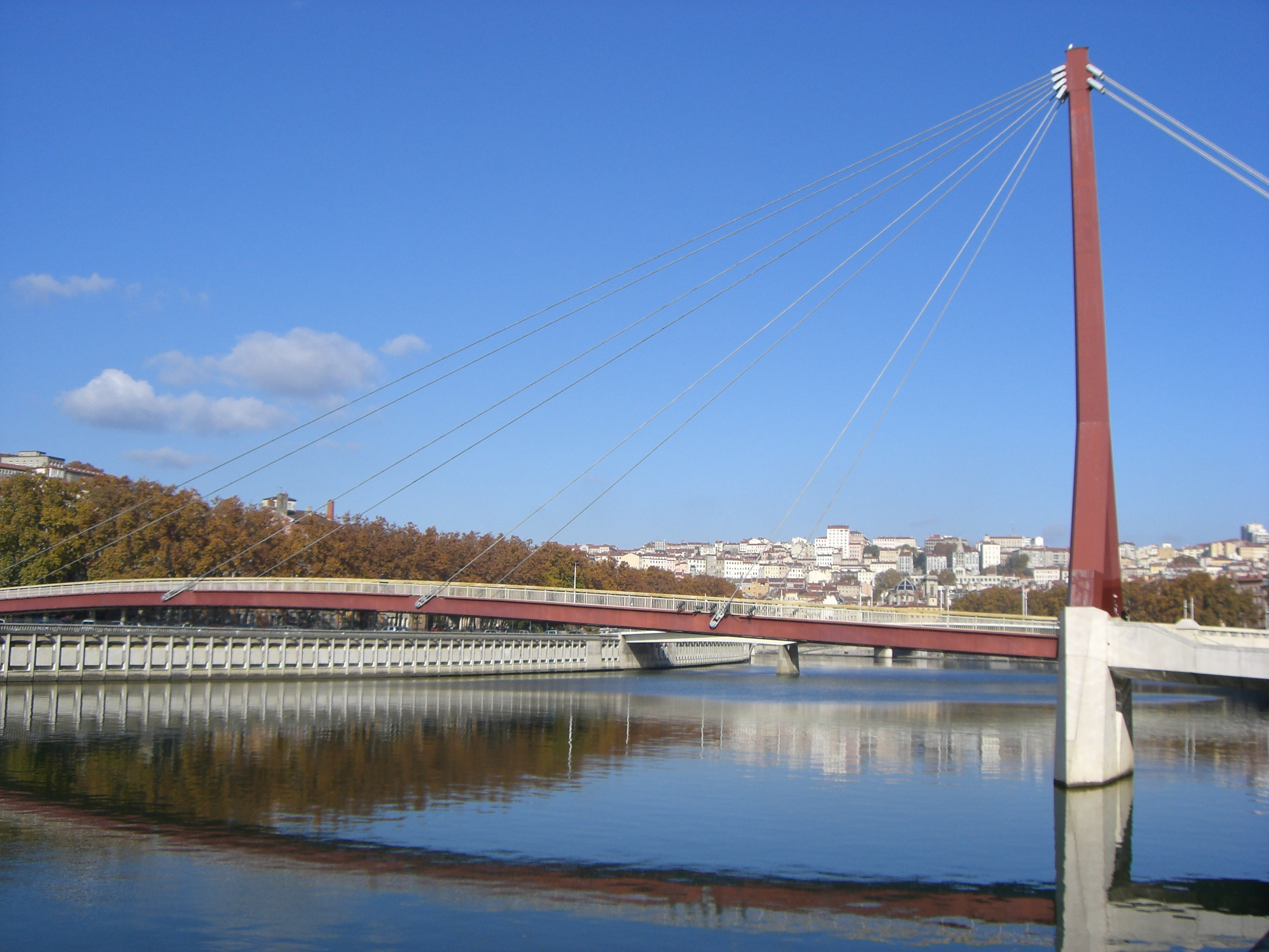 Lyon - Passerelle du Palais de Justice